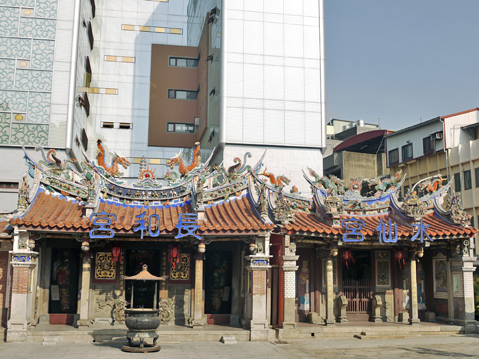 新竹水仙宮與長和宮